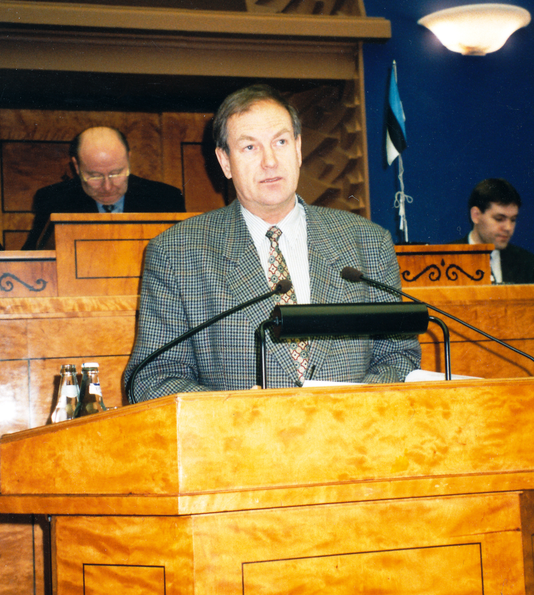 Tiit Made Riigikogus sõna võtmas